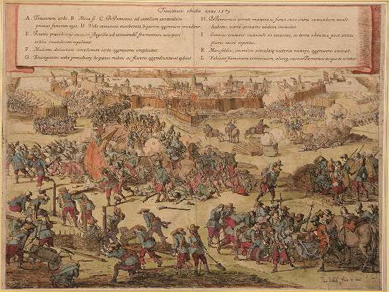 Faminio Strada, De Bello Belgico, Beleg van Maastricht door de troepen van de hertog van Parma